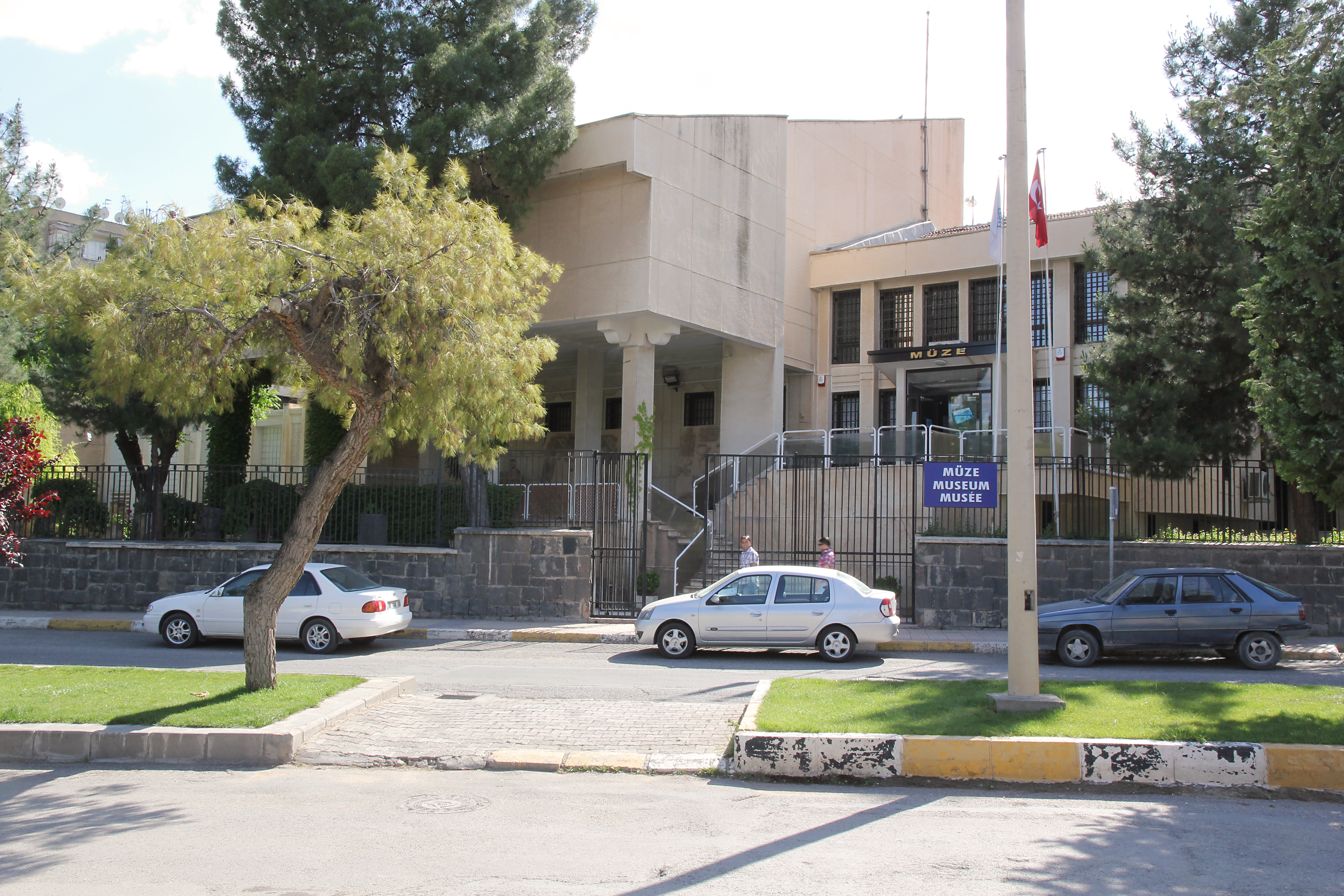 Archäologisches Museum Şanlıurfa, Südosttürkei